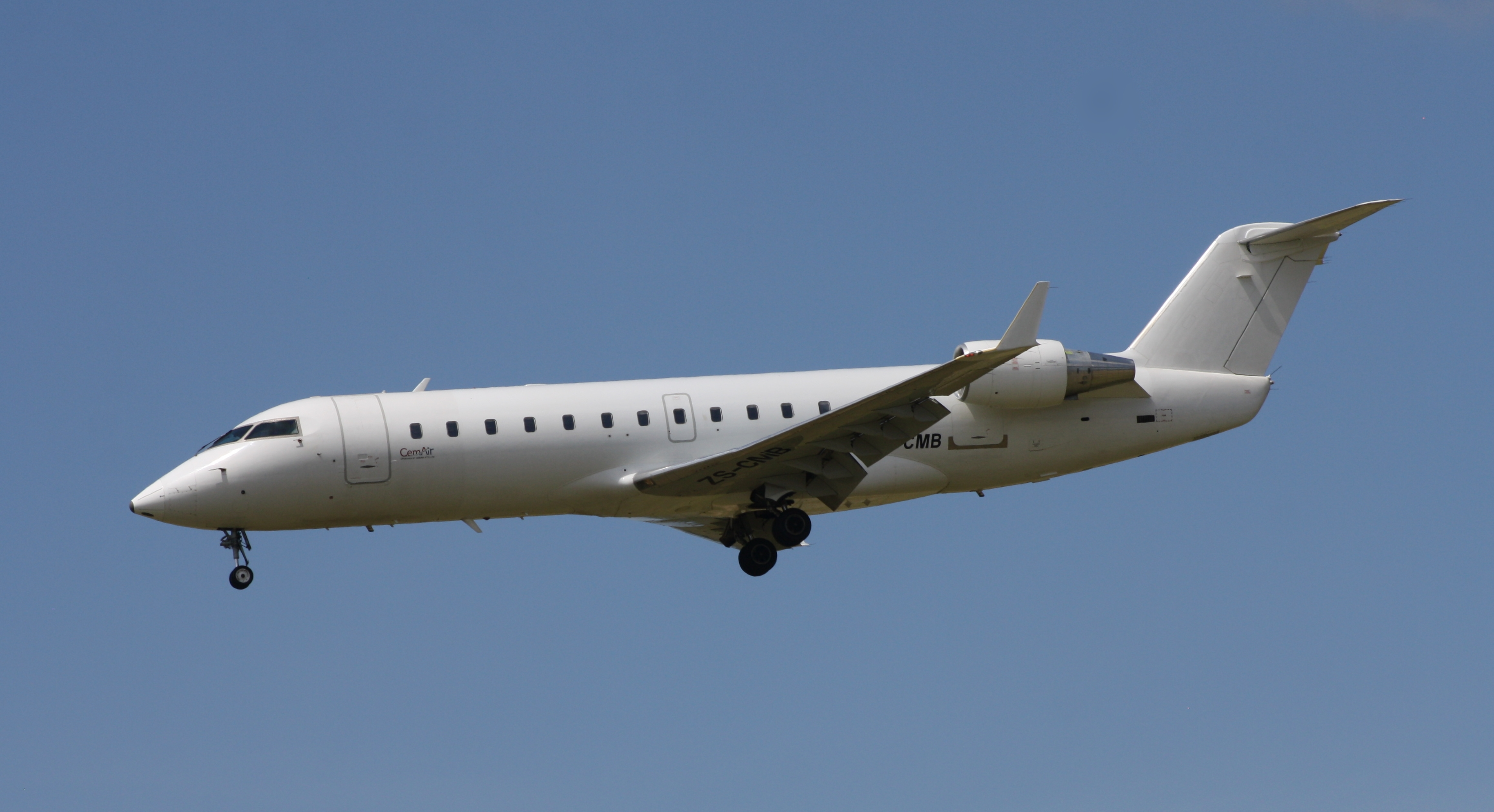 Cemair CL600-2B19 CRJ-100ER ZS-CMB